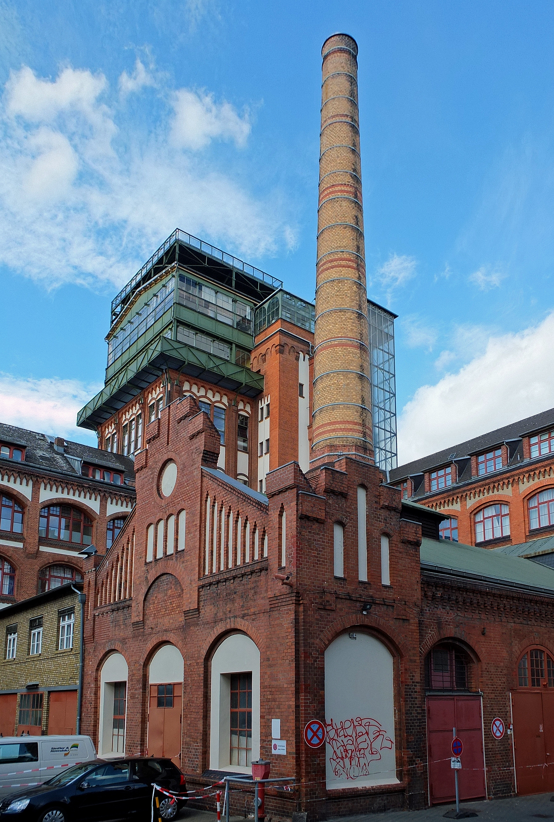 Optische Anstalt C. P. Goerz von der Holstenischen Straße (Berlin-Friedenau) aus gesehen. Im Vordergrund das Kraftwerk von 1901, im Hintergrund der 1915 errichtete Turm zur Erprobung von Fernrohren und Entfernungsmessern.This is a photograph of an architectural monument.